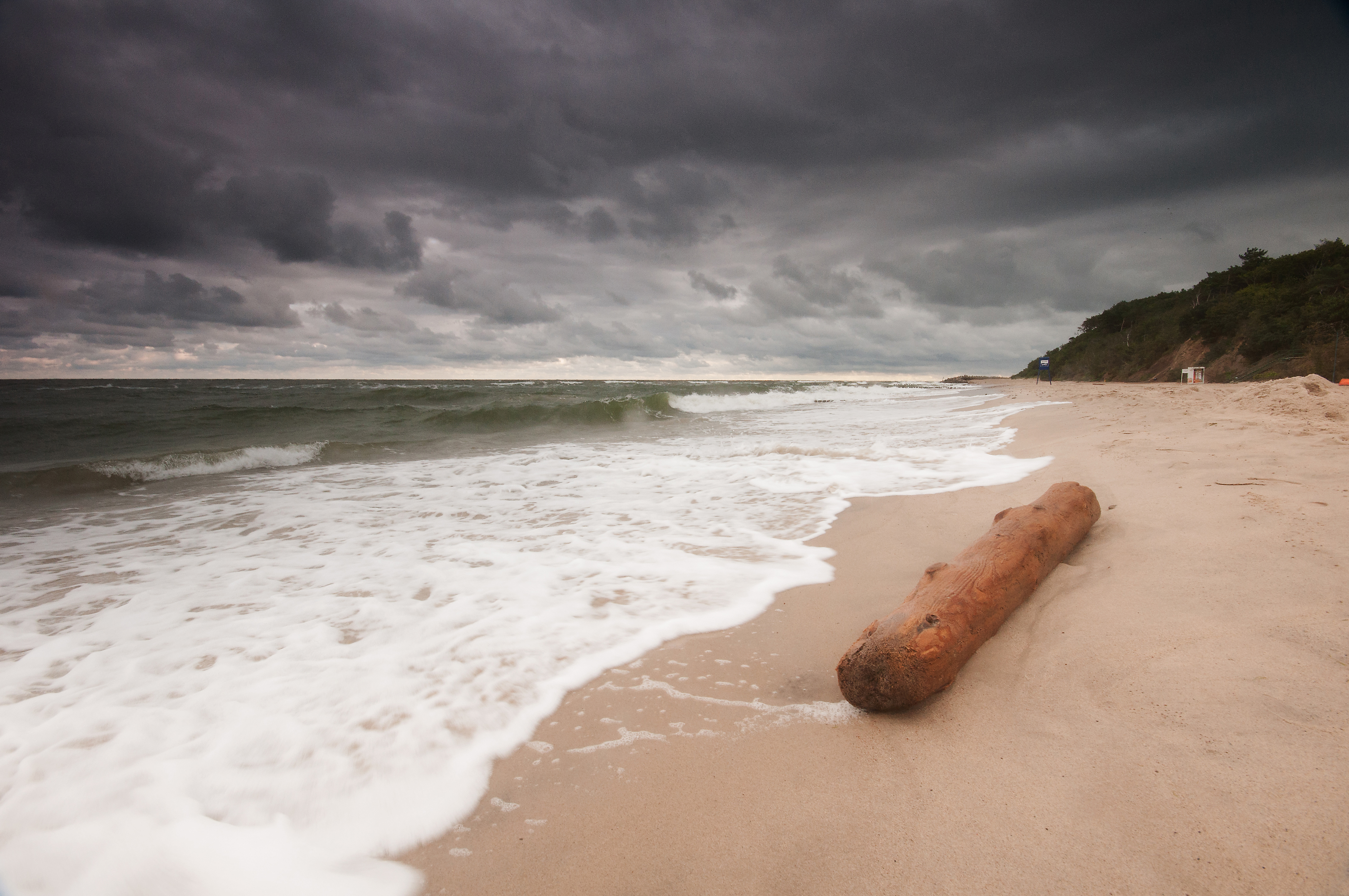 Obszar specjalnej ochrony ptaków Przybrzeżne wody Bałtyku. Rusinowo k/Jarosławca. Deszczowy poranek na plaży. This is a photography of Natura 2000 protected area with ID PLB990002